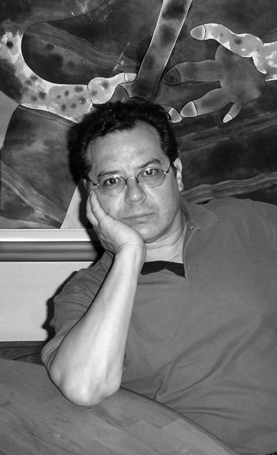 El poeta mexicano José Ángel Leyva